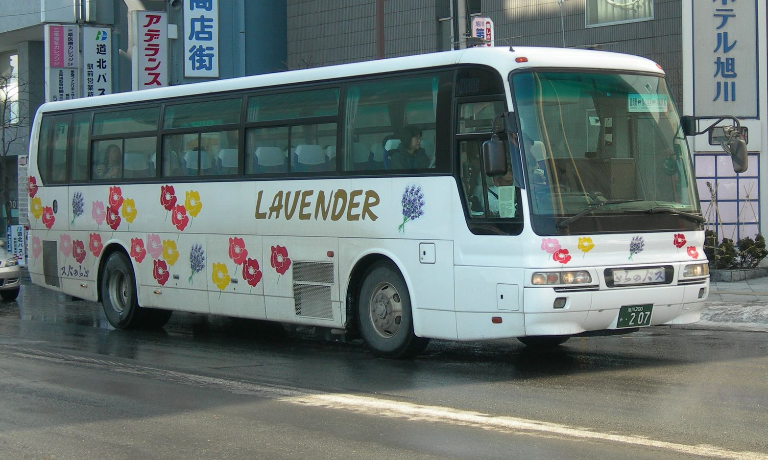 Furano Bus car ふらのバス 快速ラベンダー号